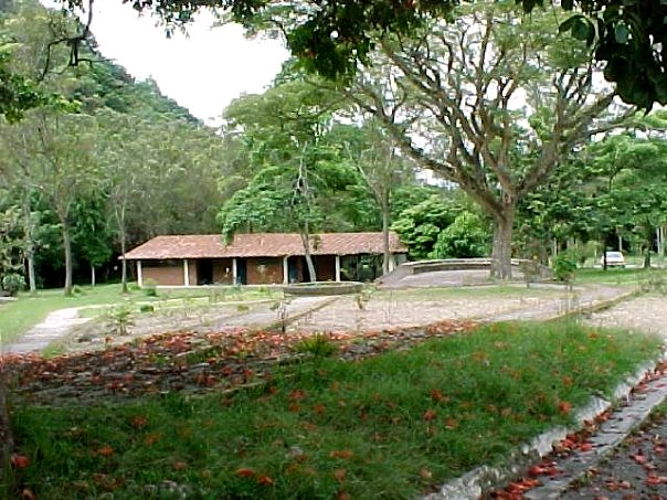 Parque Vinicio Adames; Municipio Baruta, estado Miranda - Venezuela